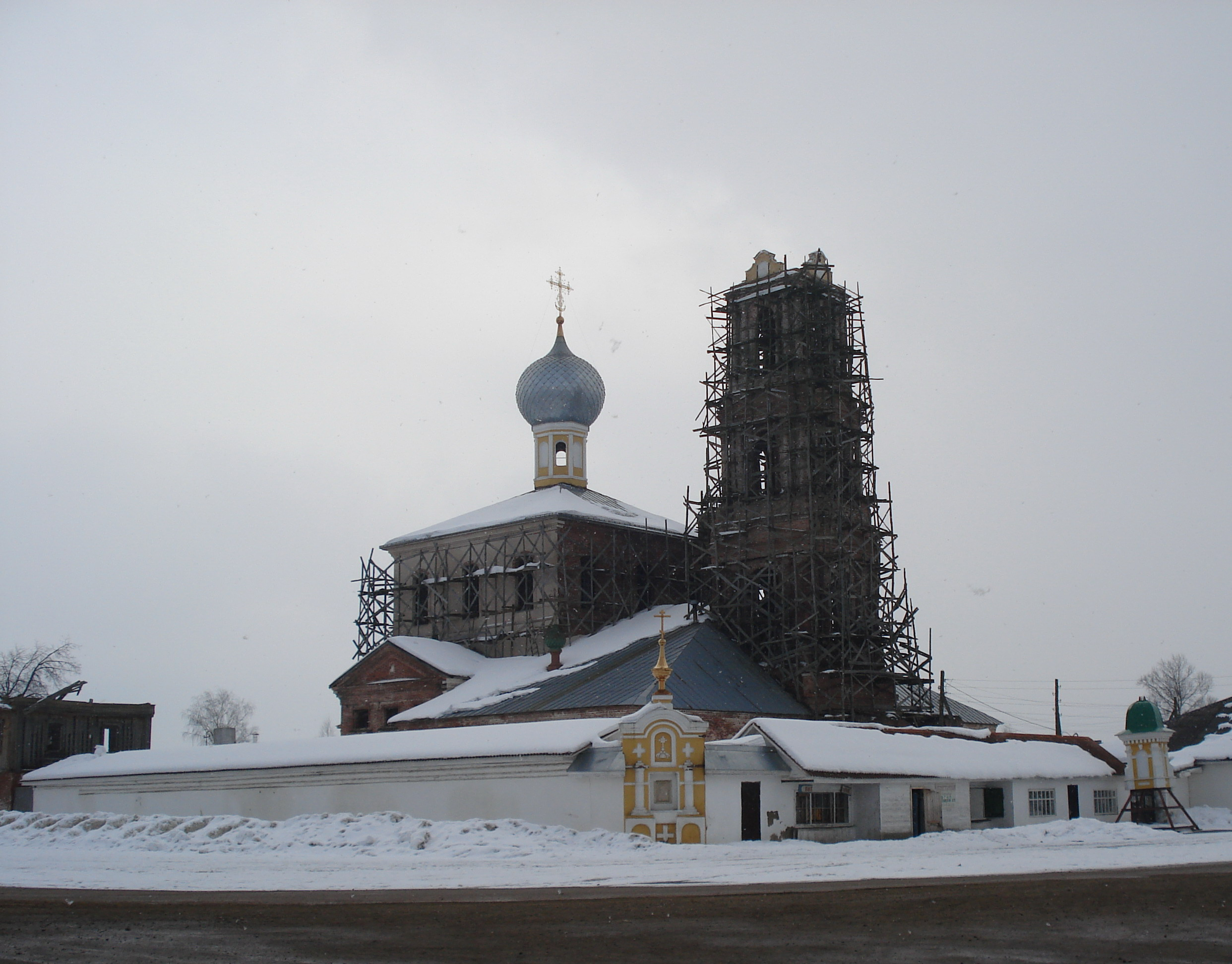 Нагорьевская церковь